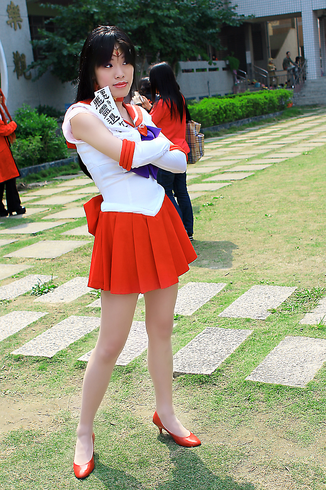 《美少女戰士》火野玲cosplayer。攝於臺中市信義國小。